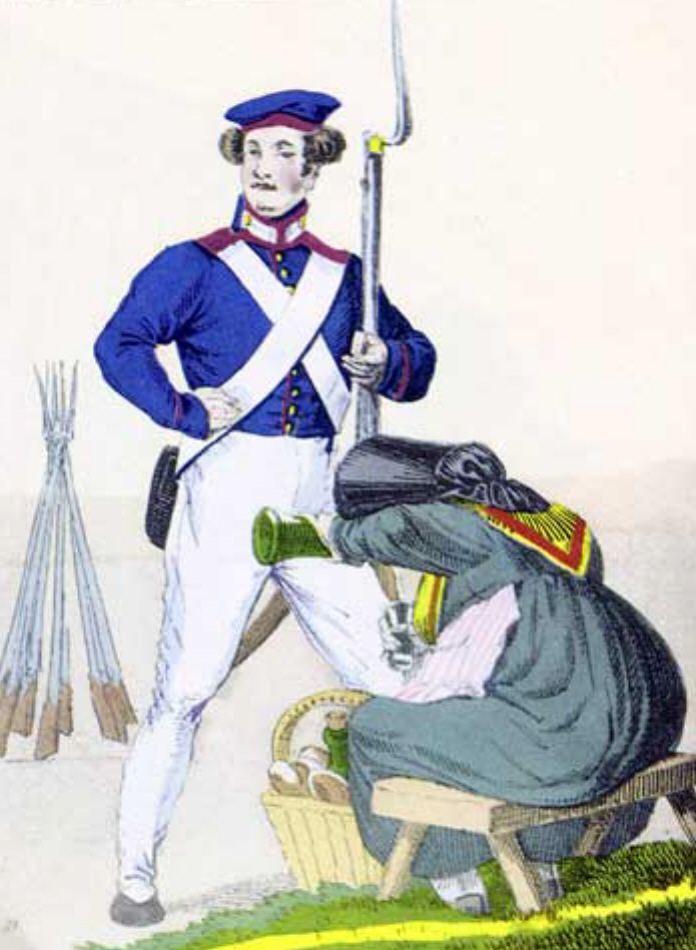 Preußischer Infanterist um 1830. Seine Kopfbedeckung ist das sogennante Krätzchen. Zeichnung von Franz Burchard Dörbeck, 1830. Originale Bildunterschrift: Vor en Sechser Kimmel! Er mag kosten wat er will.